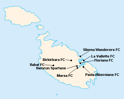 Répartition des clubs en First Division Maltaise 1956-1957.